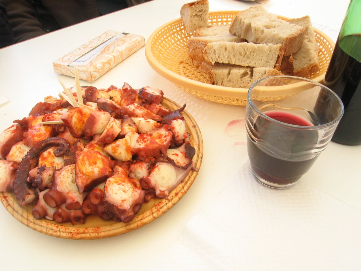 Polbo á feira, con viño tinto e pan de Ousá.